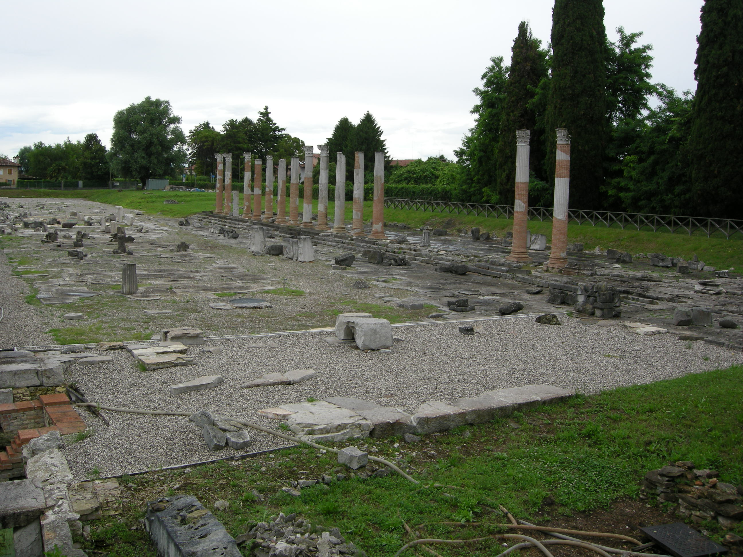 Le rovine del Foro romano di Aquileia, nell'area degli scavi archeologici.